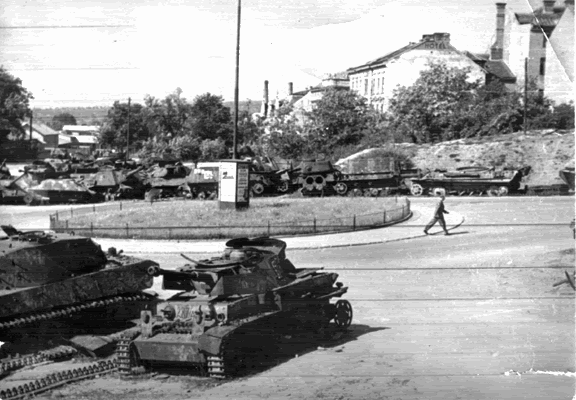 Vraky vojenské techniky ve Znojmě v květnu 1945